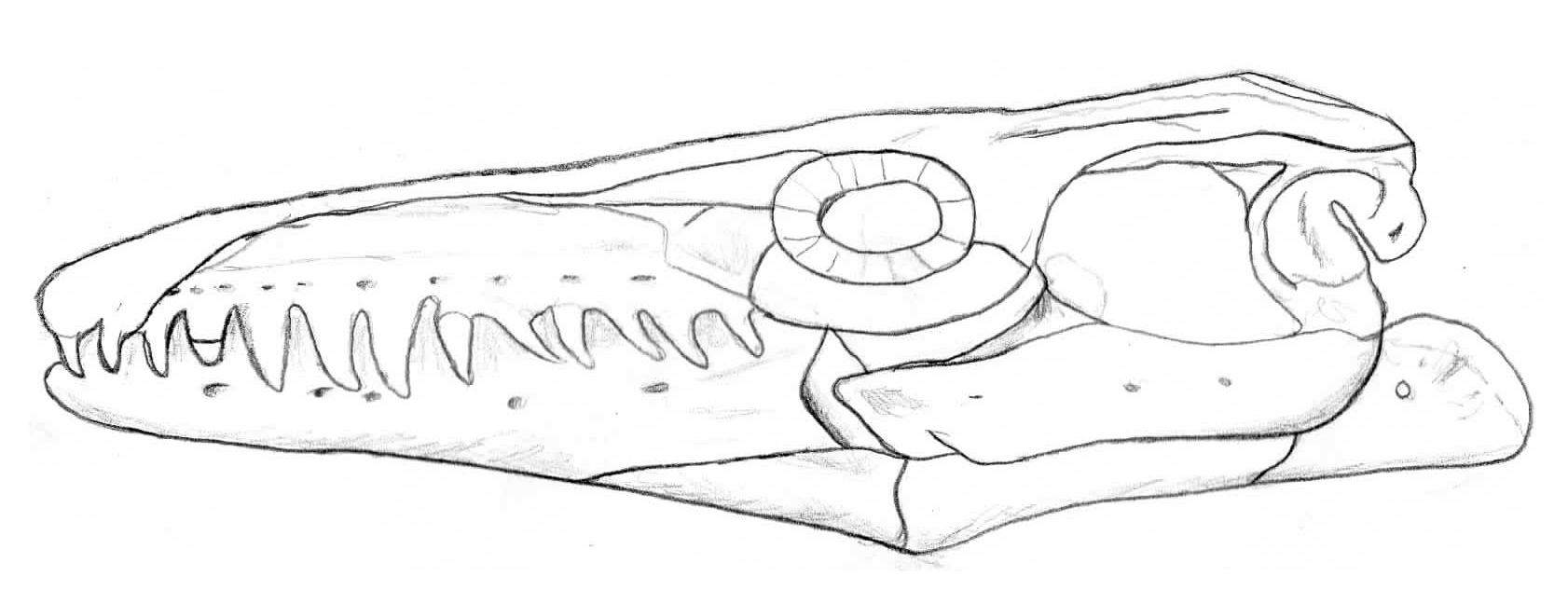 Ilustración del cráneo de Angolasaurus